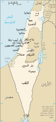 خارطة فلسطين الطبيعيَّة كاملةً: إسرائيل والضفة الغربيَّة وقطاع غزَّة.